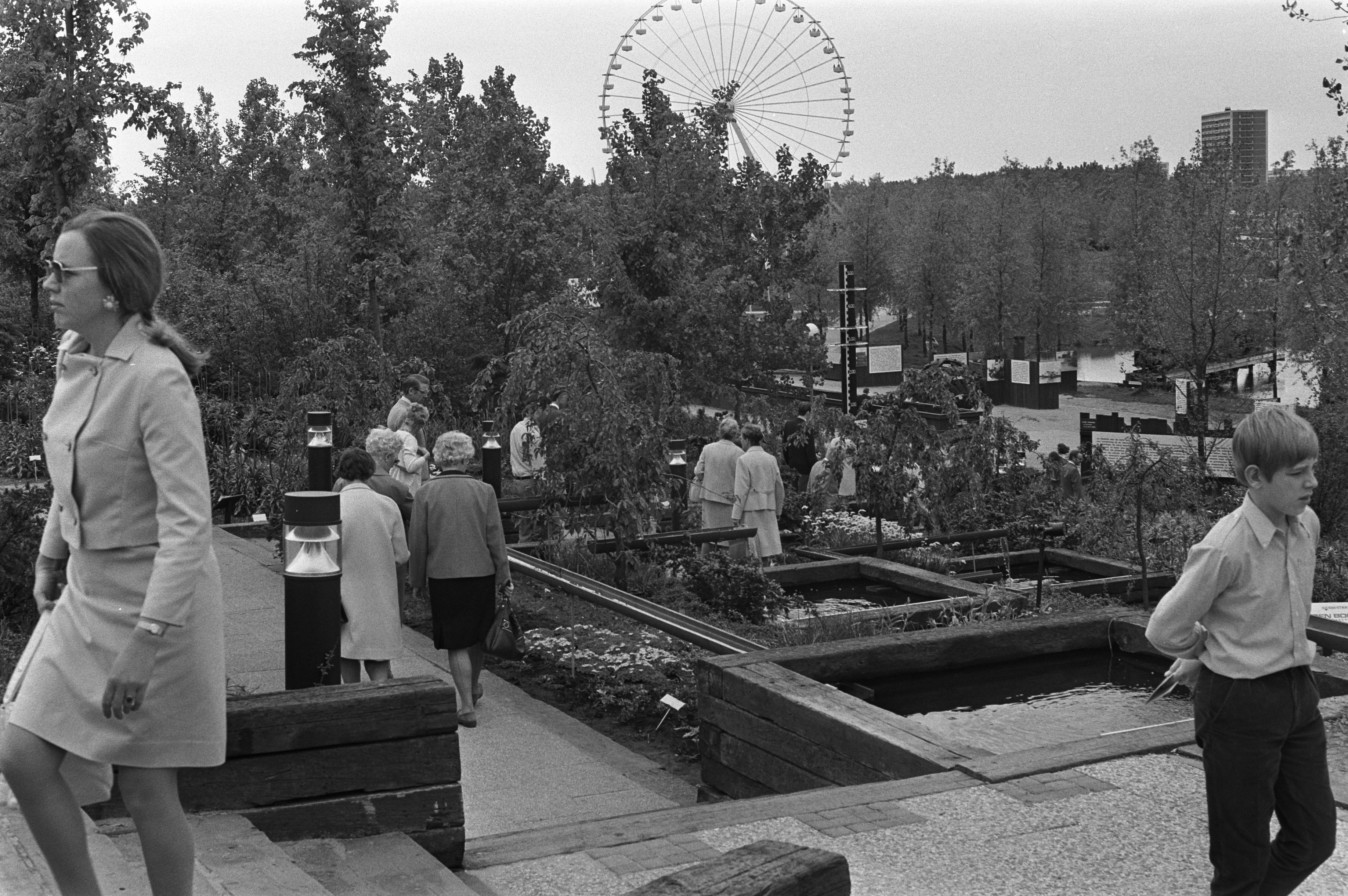 Collectie / Archief : Fotocollectie Anefo Reportage / Serie : De Floriade 1972 tijdens Pinksteren Beschrijving : Bezoekers van de planten- en bloemententoonstelling in het Amstelpark in Amsterdam Datum : 22 mei 1972 Locatie : Amsterdam, Noord-Holland Trefwoorden : tentoonstellingen, tuinbouw Instellingsnaam : Floriade Fotograaf : Rob Croes / Anefo Auteursrechthebbende : Nationaal Archief Materiaalsoort : Negatief (zwart/wit) Nummer archiefinventaris : bekijk toegang 2.24.01.05 Bestanddeelnummer : 925-6092